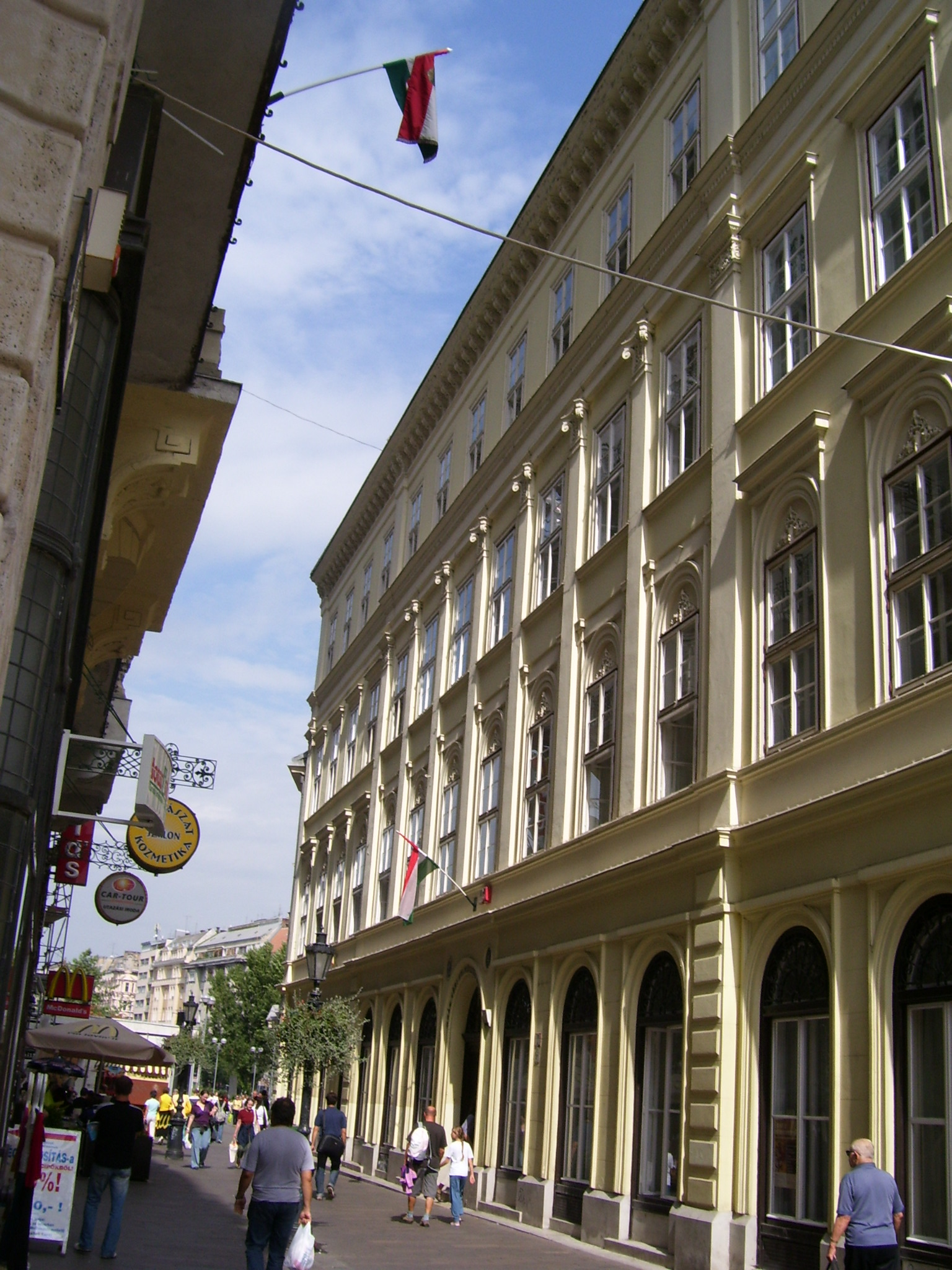 A Deák téri evangélikus gimnázium épülete (Budapest, V. ker.)